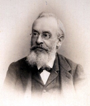 Prof. Alexander Brückner, Geschichtsprofessor Dorpat *1834 †1896